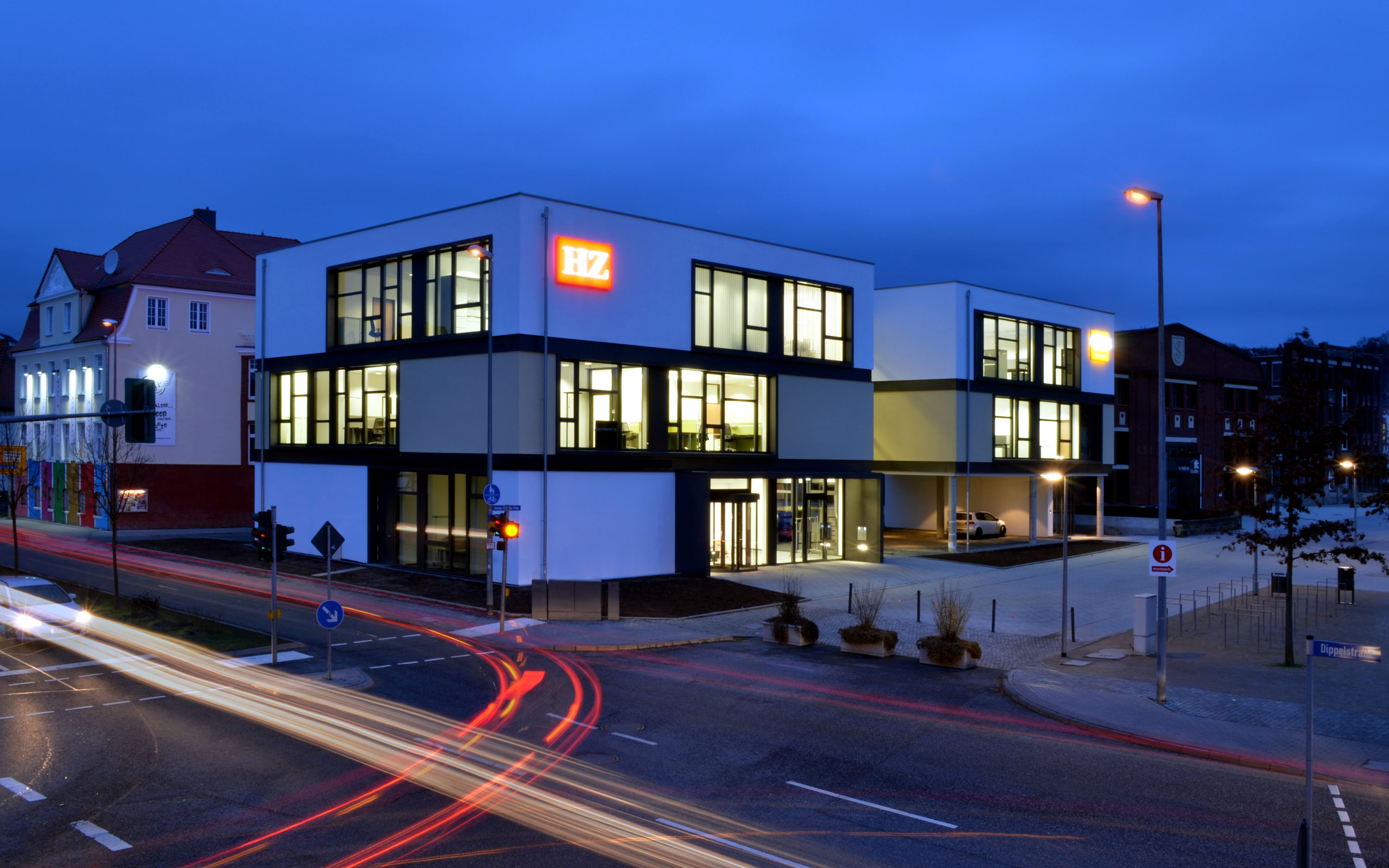 Neubau Verlagsgebäude Hersfelder Zeitung, Dezember 2013